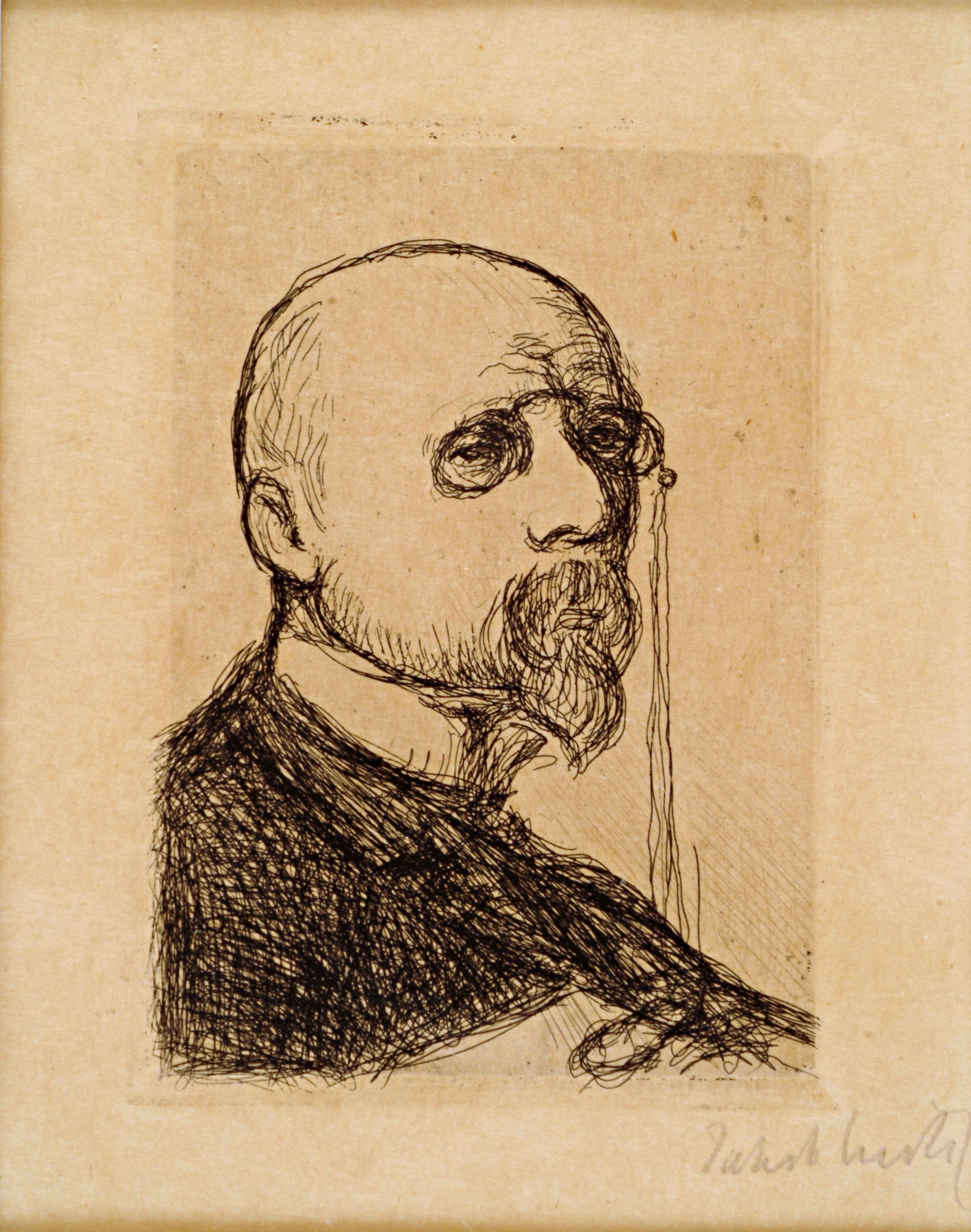 ets( Jakob Smits ( Jakob Smits Museum (